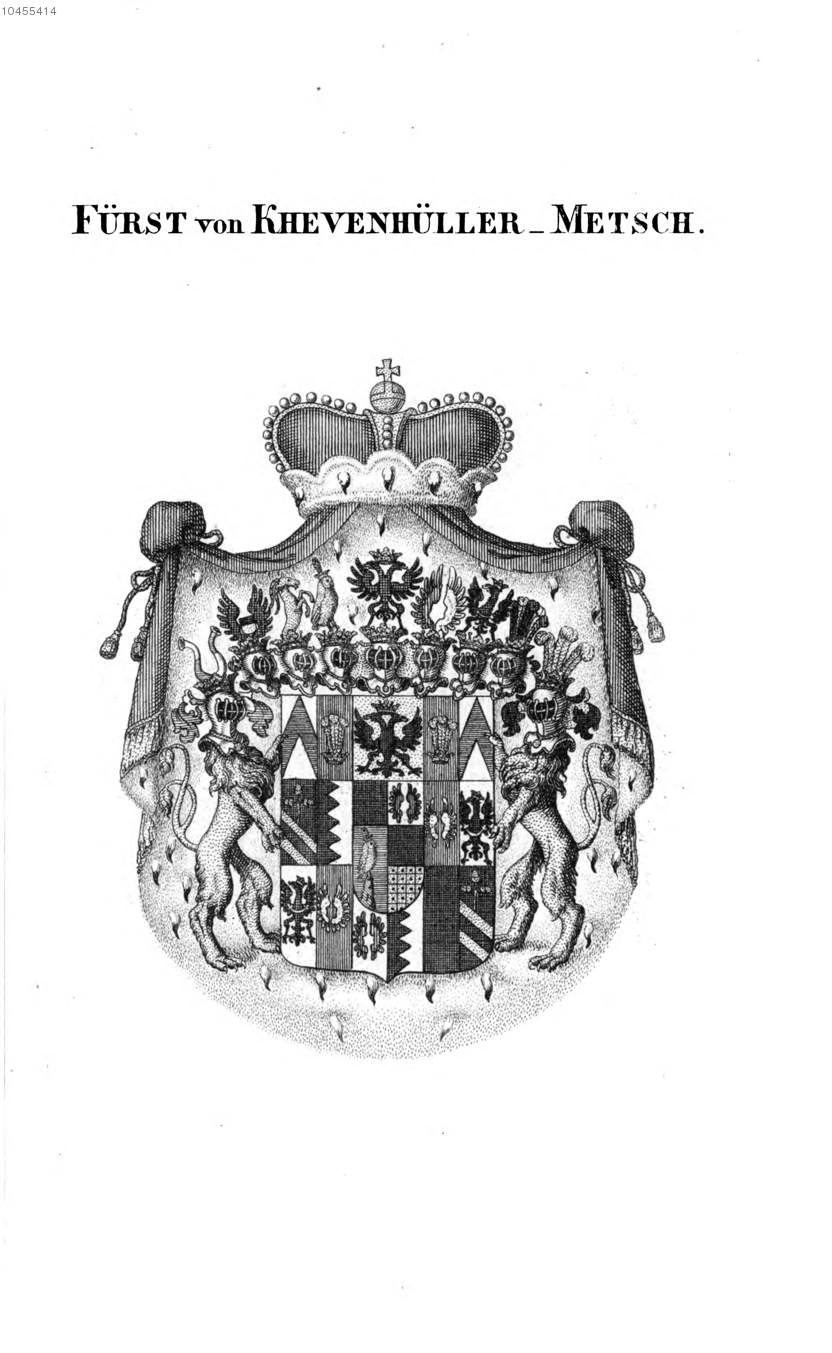 Wappen Khevenhüller Metsch 2 - Tyroff AT.jpg